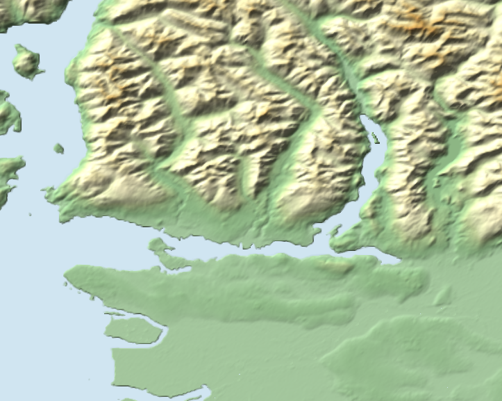 Carte en relief de la baie Burrard